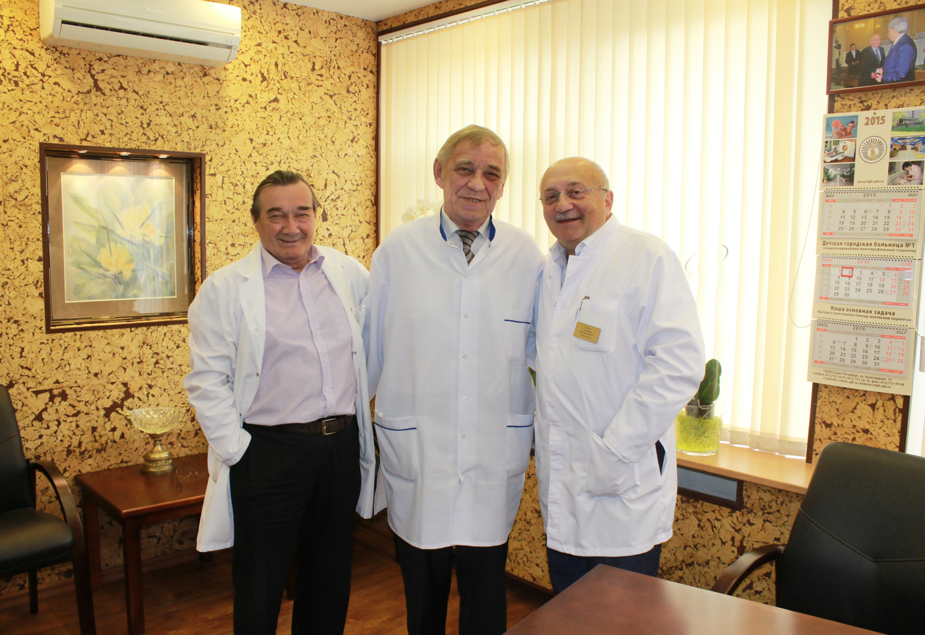 Главный внештатный специалист-неонатолог КЗ Санкт-Петербурга В. А. Любинко, профессор Н. П. Шабалов и главный врач ДГБ № 1, профессор А. В. Каган